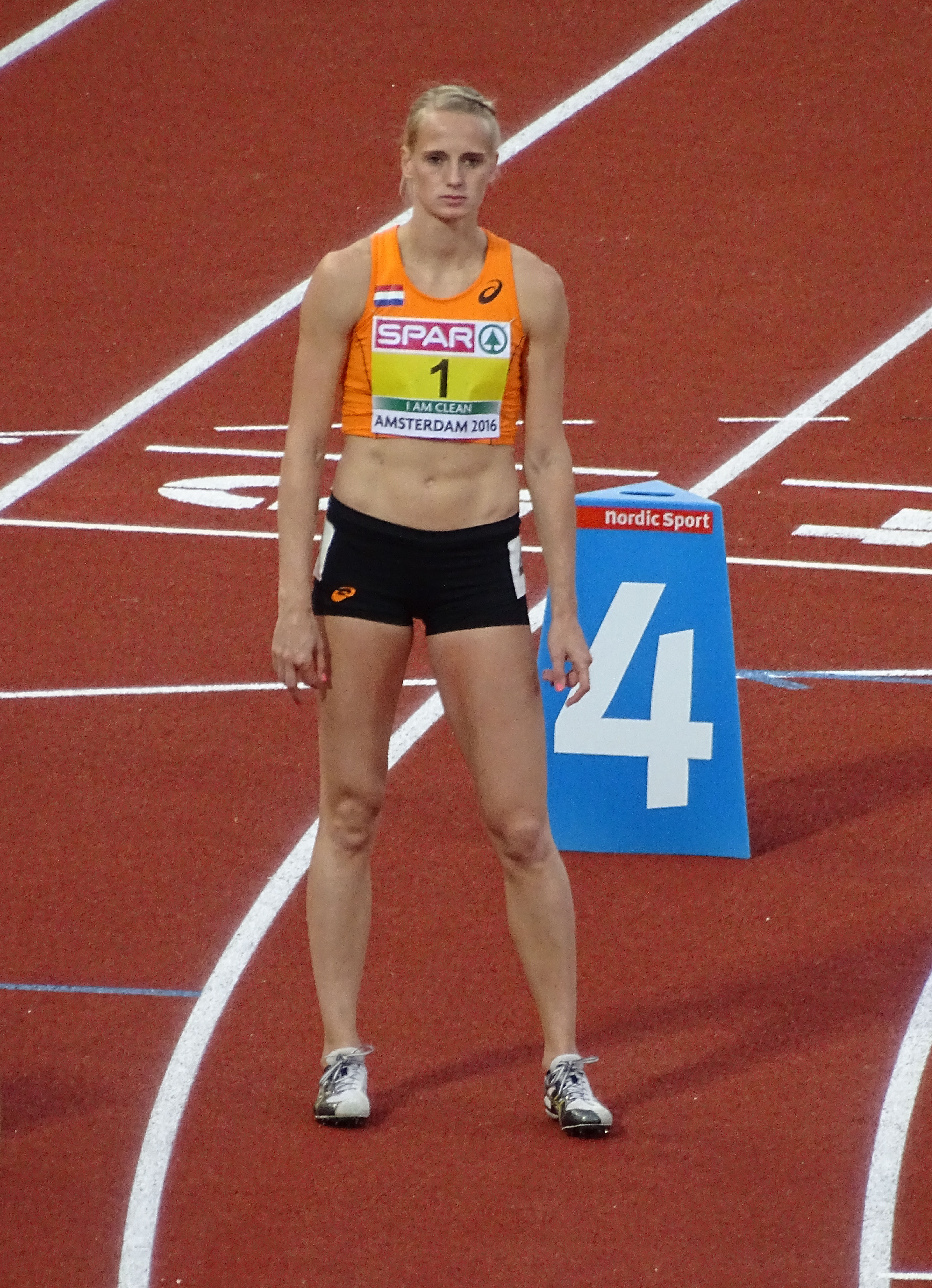 Anouk Vetter concentreert zich voor de start van haar 800 meter tijdens de zevenkamp op de EK van 2016 in Amsterdam.